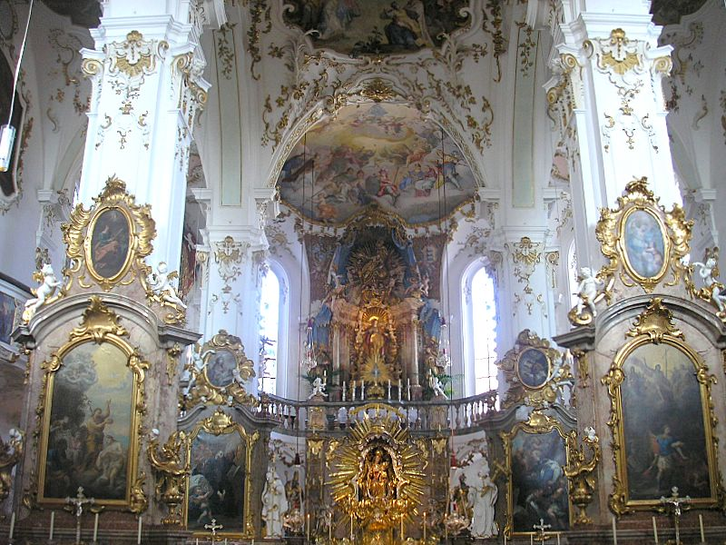 Wallfahrtskirche St. Maria (Andechs, Landkreis Starnberg, Oberbayern). Innenraum nach Osten. Eigene Aufnahme, Sept. 2006 / Andechs Monastery: Pilgrimage church of St. Mary, (Upper Bavaria, Germany). Interior, looking east. Own photo, Sept 2006